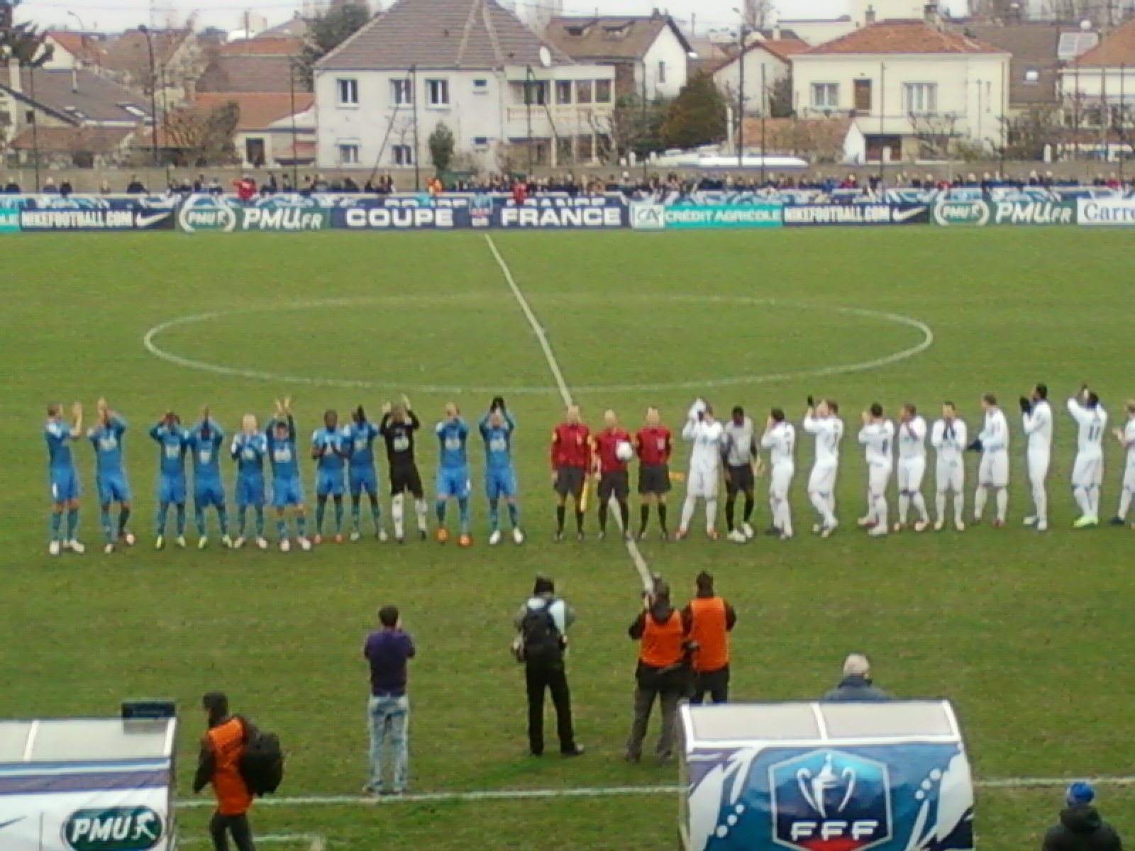 Présentation des équipes lors du match JA Drancy - RC Strasbourg du 08 janvier 2012 au stade Charles-Sage